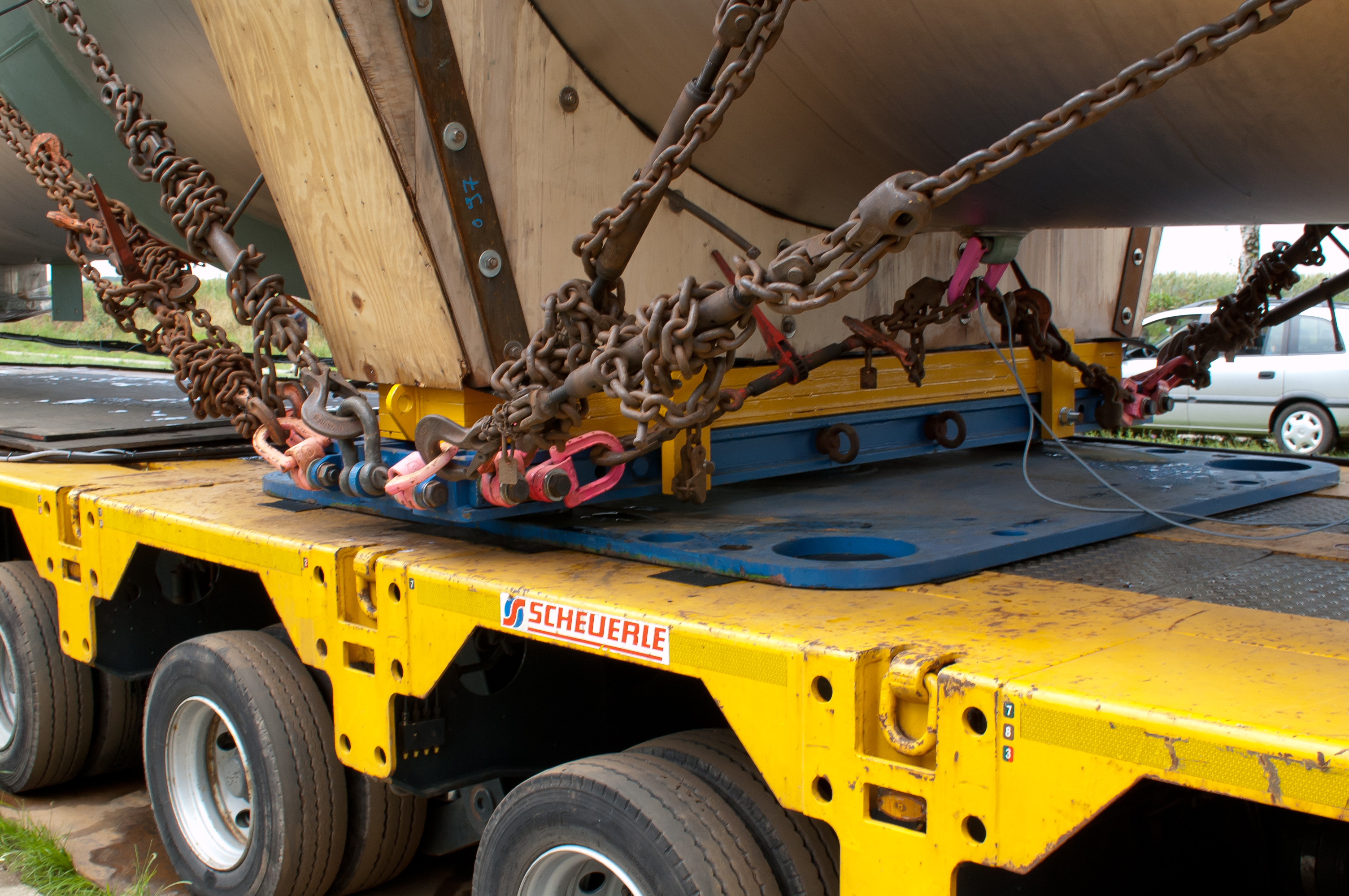 Schwertransport mit einem Anlagenbauteil unterwegs von Eschweiler bei Aachen zum Maashafen in Echt (NL)zwecks Verladung auf Binnenschiff zum Weitertransport zur BASF in Ludwigshafen. Die Gesamtlänge des Schwertransportes beträgt rund 83 m. Aufnahme an der Tagespausenstelle des Transportes auf der N 274 ungefähr halbwegs zwischen Saeffelen und Koningsbosch. Detailaufnahme des Drehtellers und des Ladegutes auf dem Scheuerele Schwerlastroller mit den Verzurrketten (lt. Kettenschild Ketten für 16 t Last)